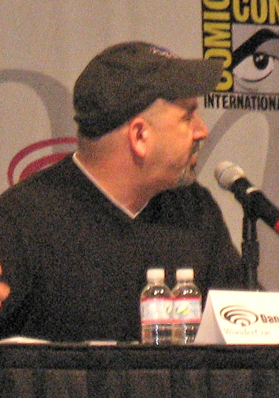 Dan DiDio